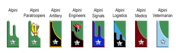 Alpini Mostreggiature (Collar Patches)